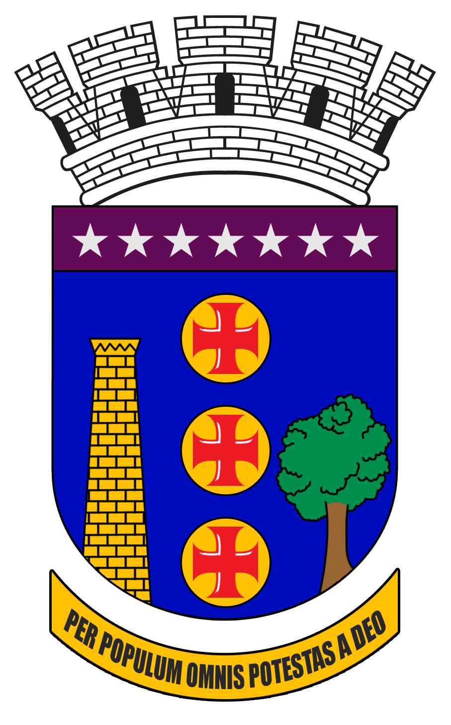 Ilustração feita por Mateus Zica Machado Brandão em 26 de maio de 2006. -- *Ilustração baseada no brasão de 1963. Foram adicionados novos detalhes tridimensionais nos tijolos da torre do Itaú. Ilustration created by Mateus Zica Machado Brandão in May 26 2006. -- *Ilustration based in Coat of arms from 1963. Added New trindimensional details in the bricks in the itau tower. Livre para usar em qualquer lugar. Bandeira de Contagem.